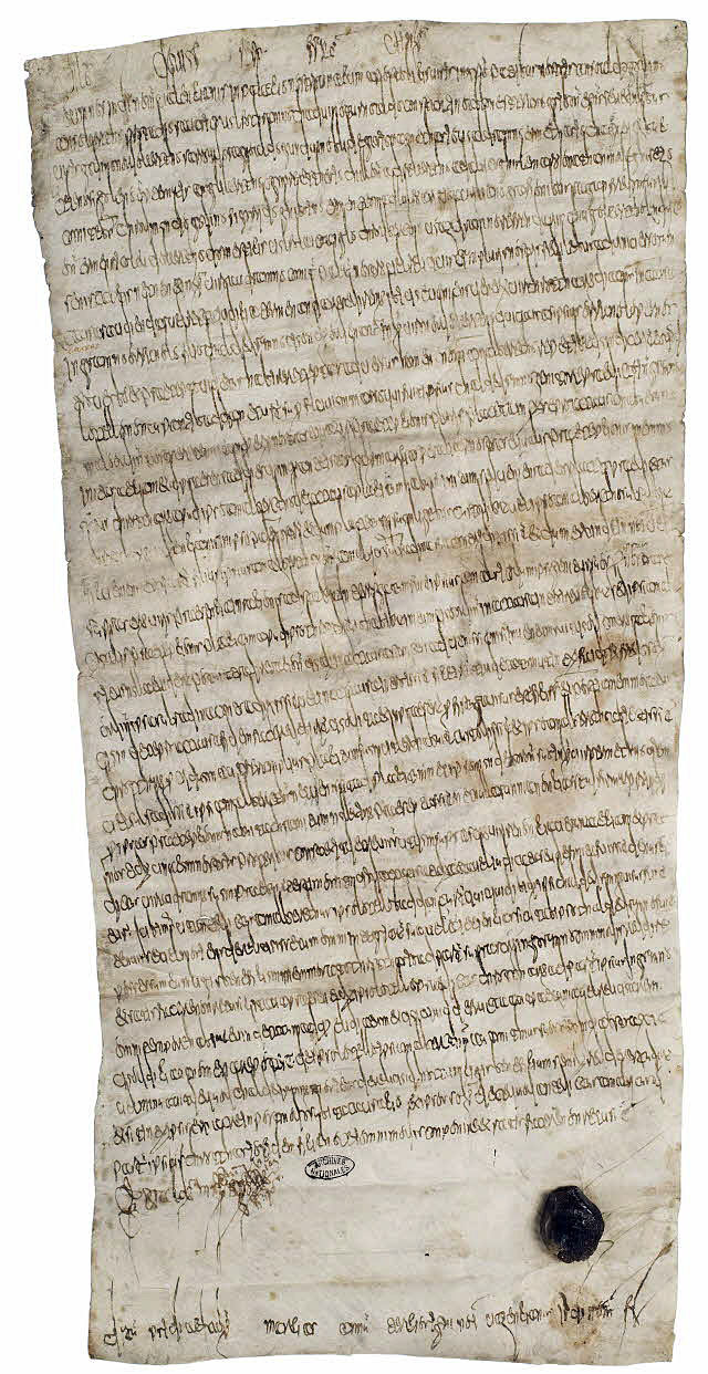 Jugement par lequel le roi Clovis III remet un orphelin nommé Ingramnus en possession de la terre de Baddanecurt(e) en Beauvaisis dont s'était emparé un certain Amalbercthus. Valenciennes